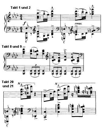 Variation in Johannes Brahms Klaviersonate Nr. 3 in f-Moll